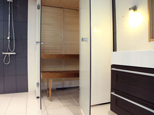 Kokoontaitettava kylpyhuonesauna tuo luksusta pieniinkin kylpyhuoneisiin.